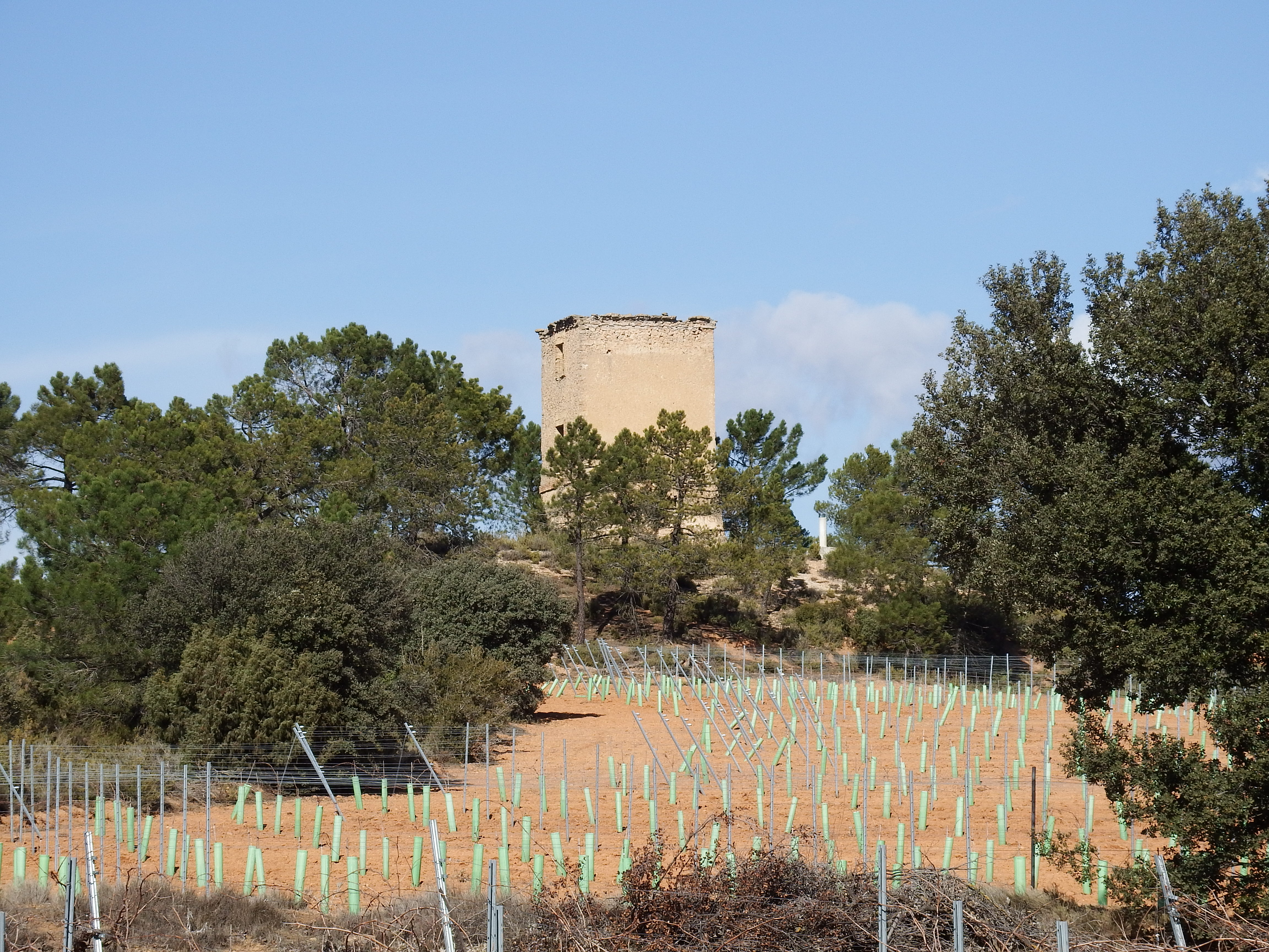 Torre de telegrafia óptica de Graja de Iniesta